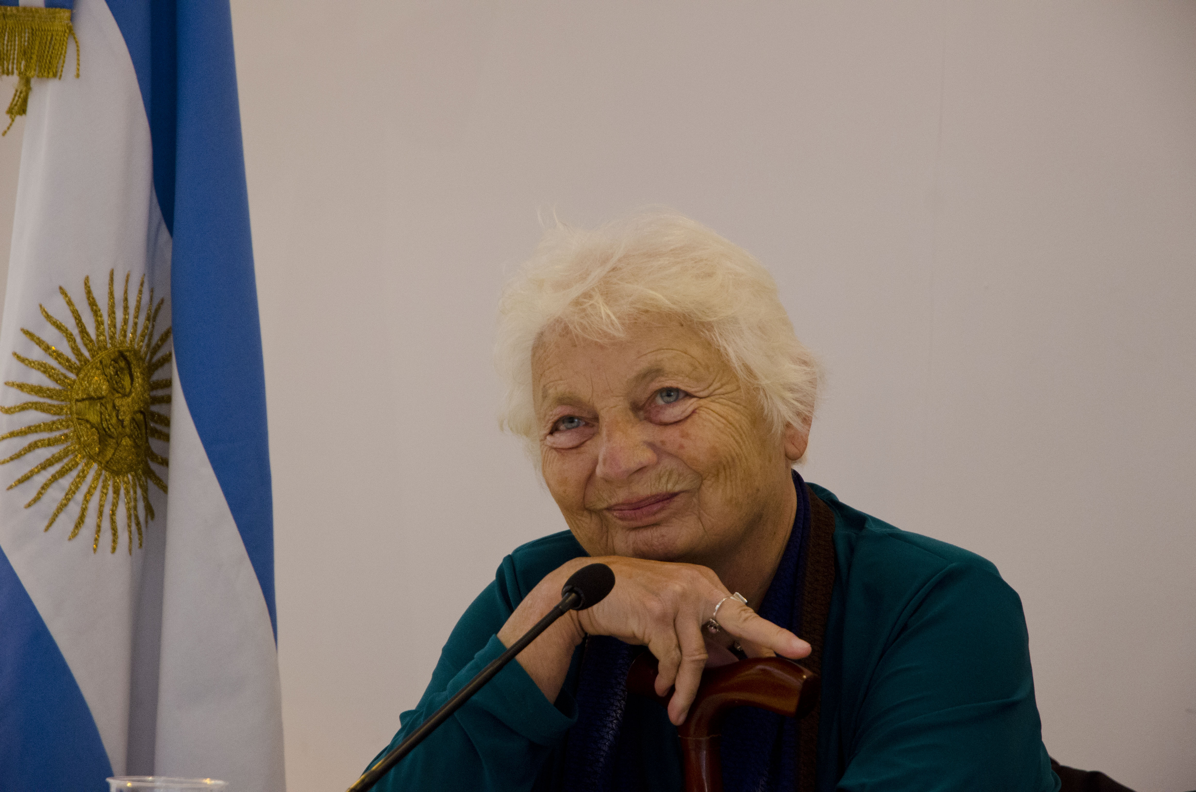 Argentine poet Diana Bellessi at the 2014 Paris Book Fair. Photo: Augusto Starita / Secretaría de Cultura de la Presidencia de la Nación